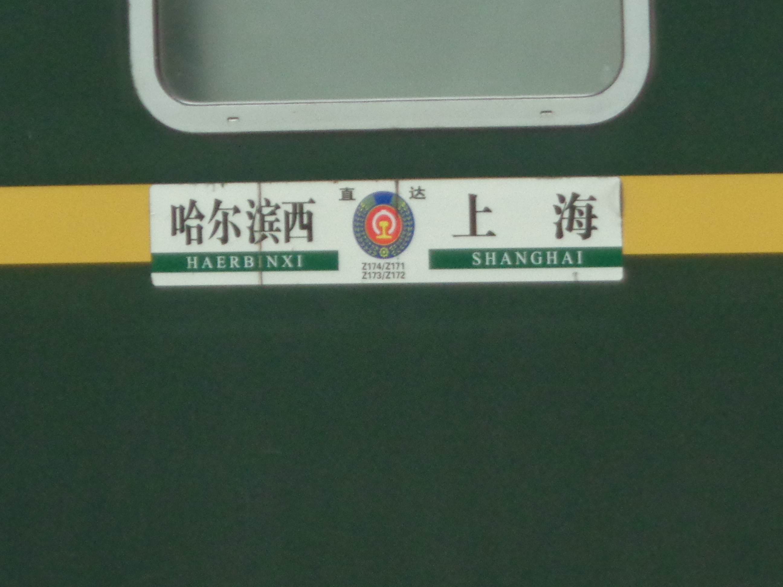 哈尔滨西-上海列车水牌